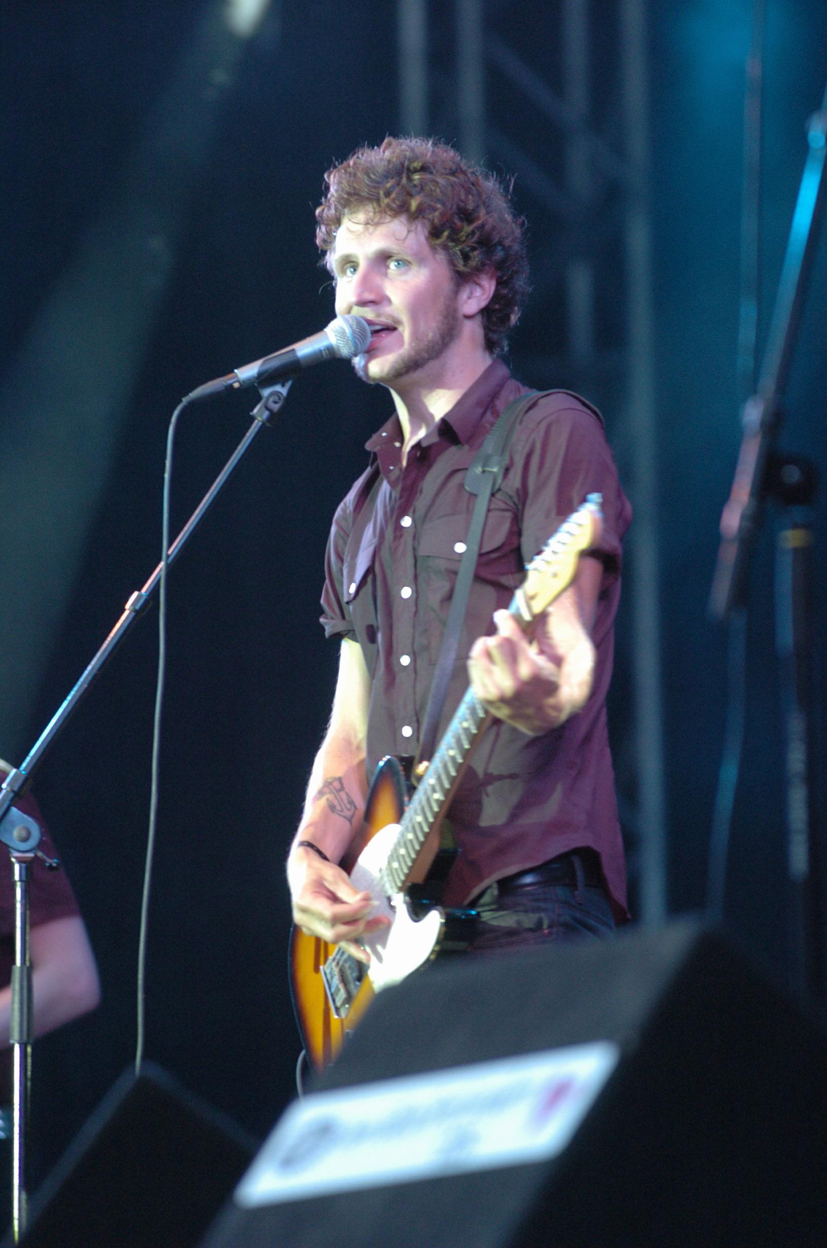 Fotat på Arvikafestivalen 2005.